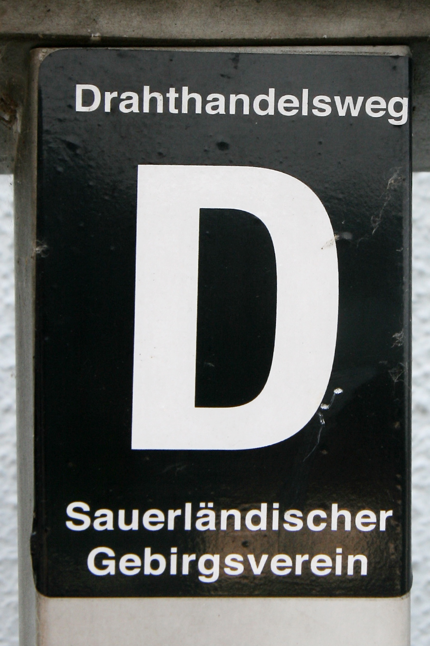 Wanderwegmarkierung Drahthandelsweg in Altena.